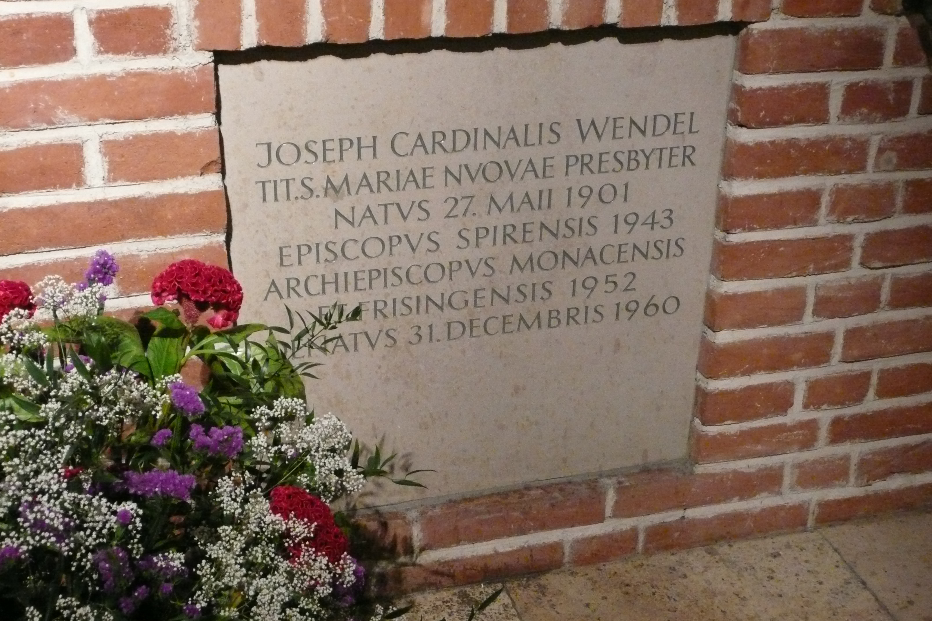 Grabstätte Joseph Wendels im Münchner Dom